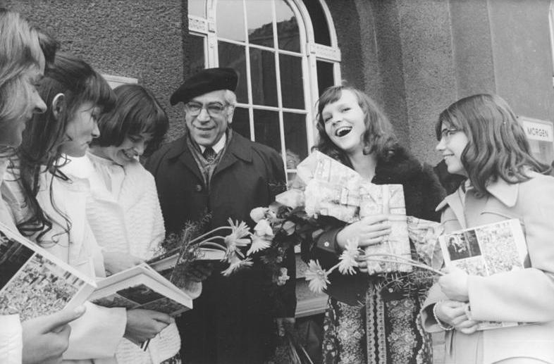 Berlin, Jugendweihe, Willi Schwabe ADN-ZB Reiche 25.4.1976 Berlin: Das feierliche Gelöbnis zur Jugendweihe legten am Sonntag (25.4.) die Jungen und Mädchen der achten Klassen der Anton-Saefkow-Oberschule (Prenzlauer Berg) im Berliner Ensemble ab. Der Schauspieler Willi Schwabe, hier zusammen mit jungen Mädchen nach der Veranstaltung, trug mit dazu bei, der Feierlichkeit einen würdigen Rahmen zu geben.